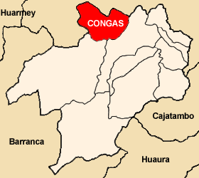 Distrito de Congas